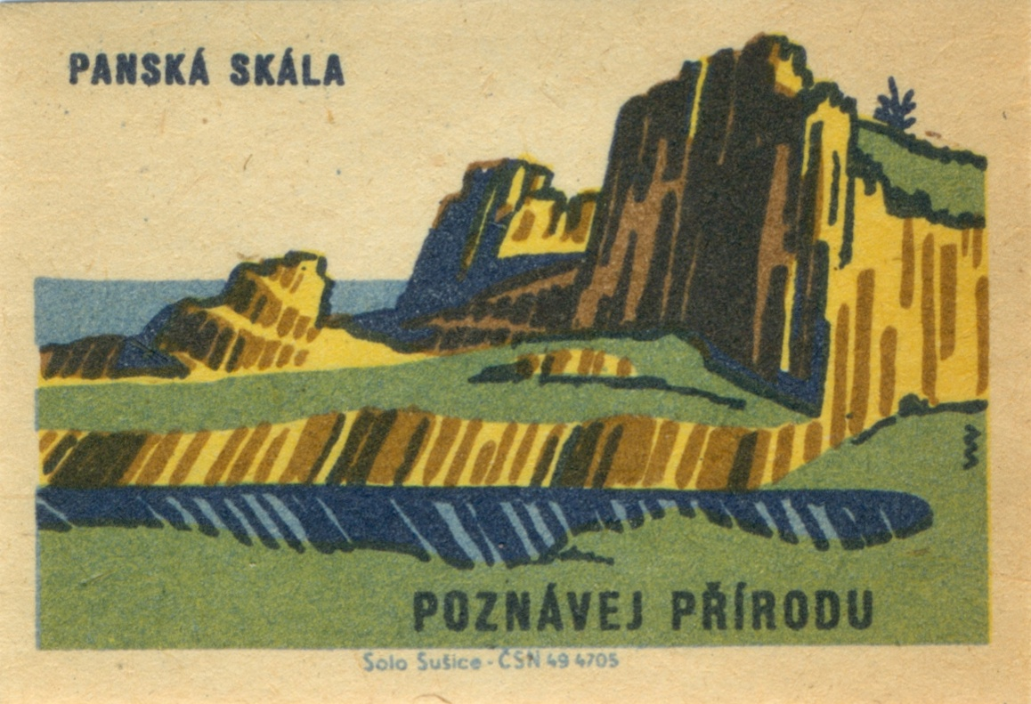 zápalkové nálepky